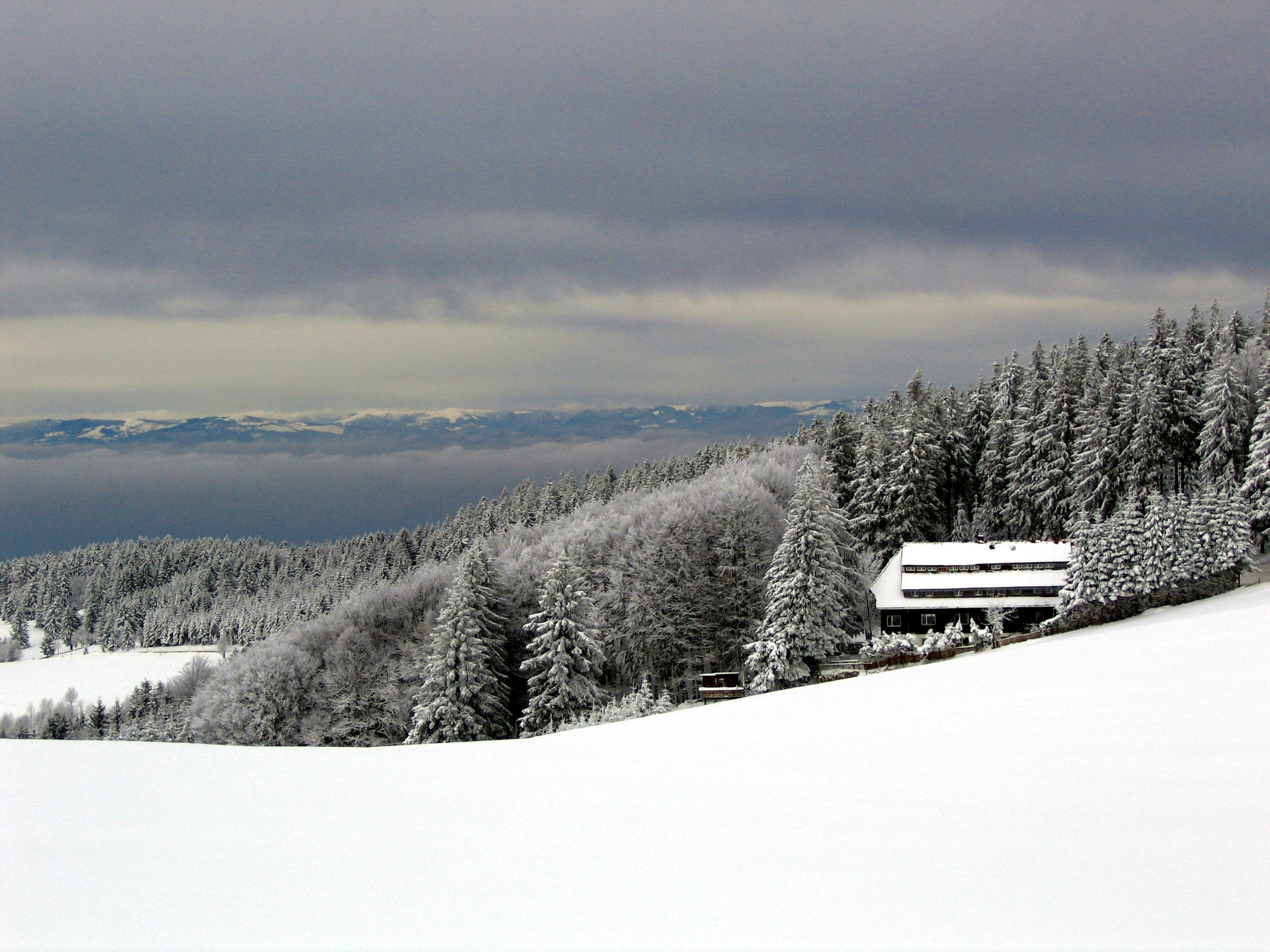 Der Schwarzwald im Schnee mit den Vogesen im Hintergrund